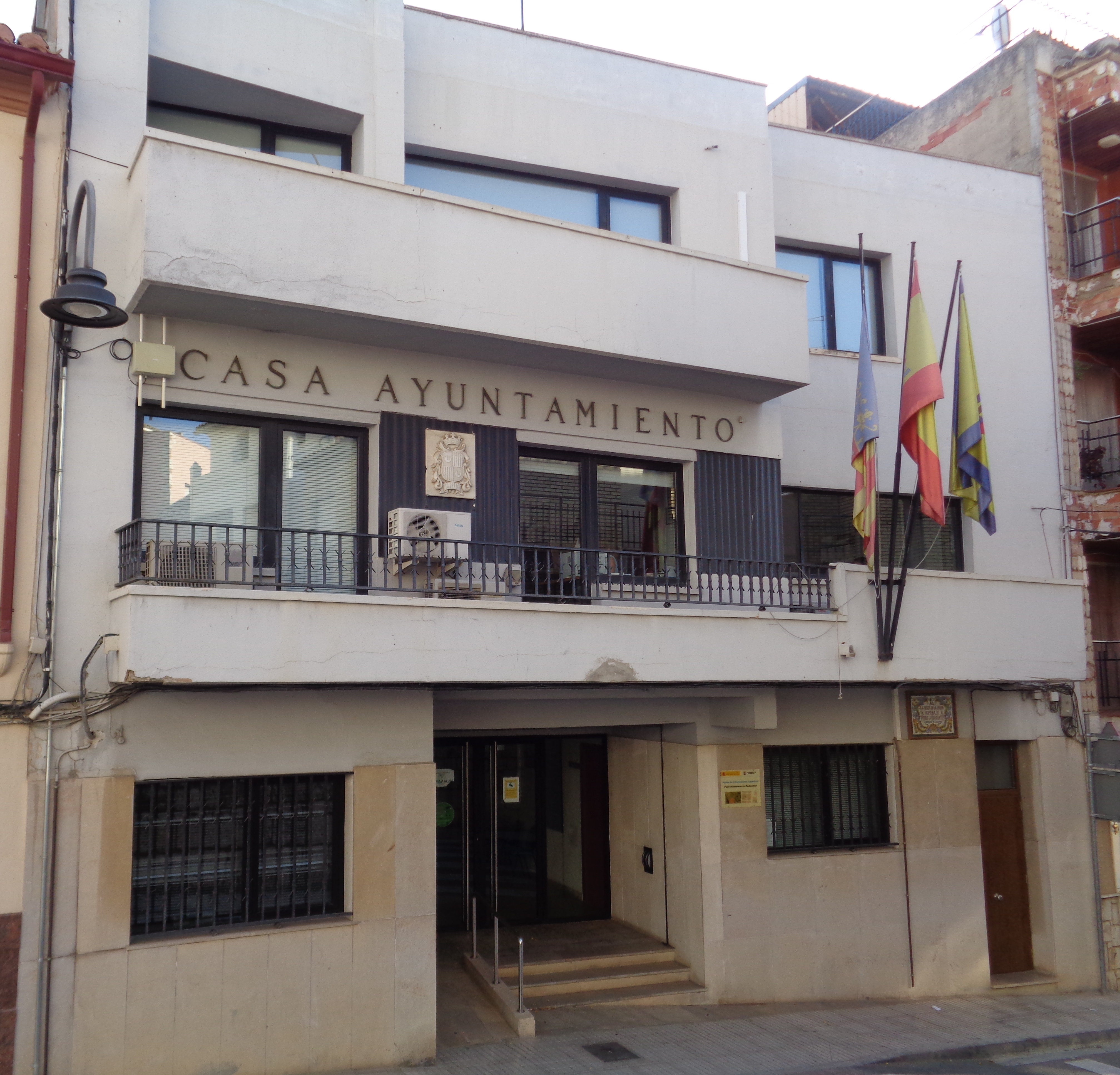 Alboraig.